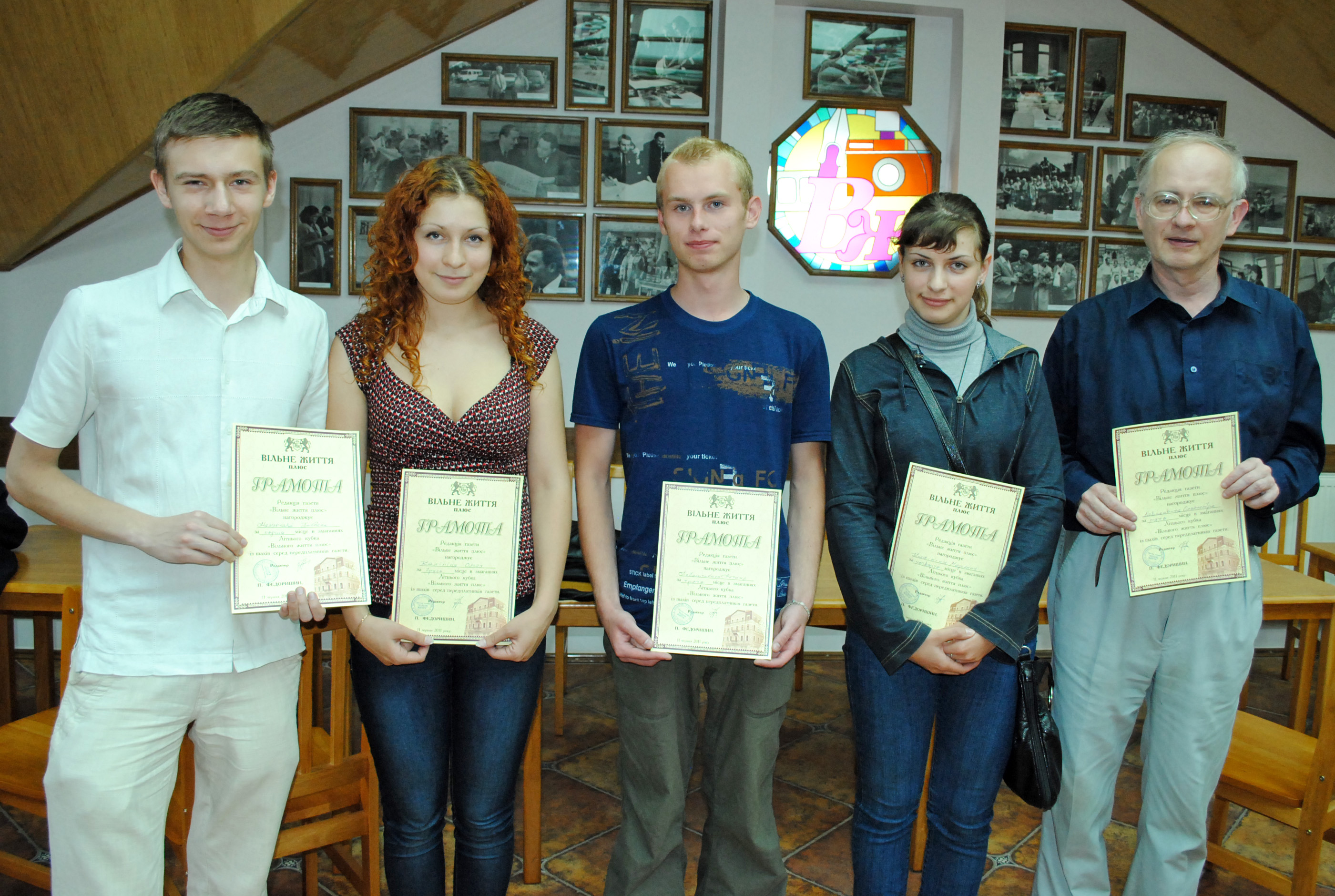 Призери традиційного розіграшу літнього кубка зі швидких шахів серед передплатників газети «Вільне життя плюс»: Богдан Мазурчак (перше місце), Ольга Калініна (друге місце), Антон Подольський (третє місце), Маріанна Калініна (четверте місце) та Олександр Давидович (п’яте місце). Літній кубок відбувся в редакції газети 11 червня 2011 року.